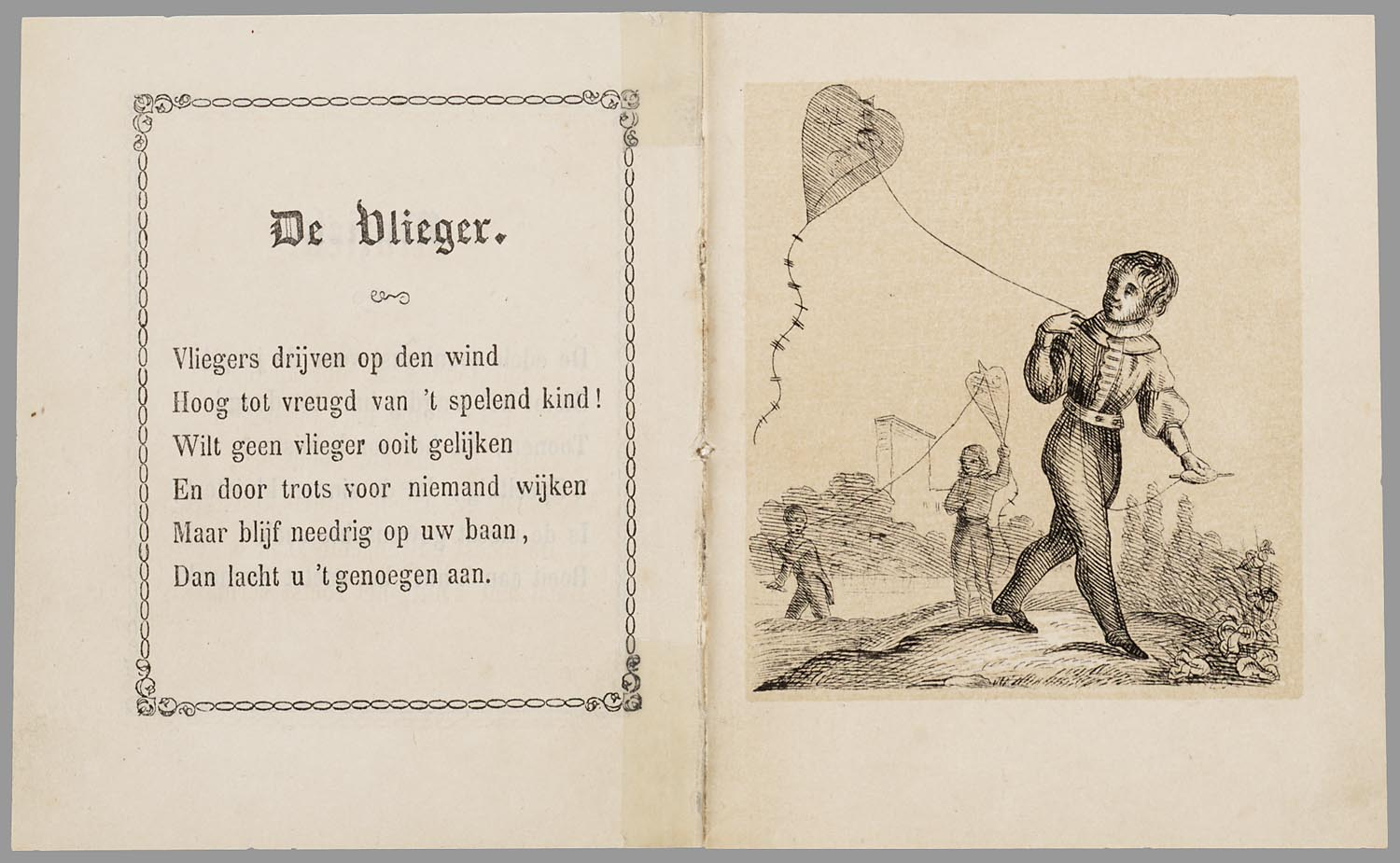 Prentenboekje met pagina's met een toonlitho naast pagina's met een omkaderde rijmende tekst, over verschillende spelen, voorzien van wijze lessen. 16 p., 16 bl. pl : toonlith // De keerzijde der illustraties is onbedrukt // Bevat: Muziek ; De vlieger ; Jagtvermaak ; Kooten ; Steenen-werpen ; Vangertje ; Schaatsen-rijden ; Wippen ; Sneeuw-vermaak ; Vogel-vermaak ; Haasje-over ; Vasten avond ; Kegelen ; Tollen ; De kanonier ; De luchtbal Spel // Jongens // Prentenboeken